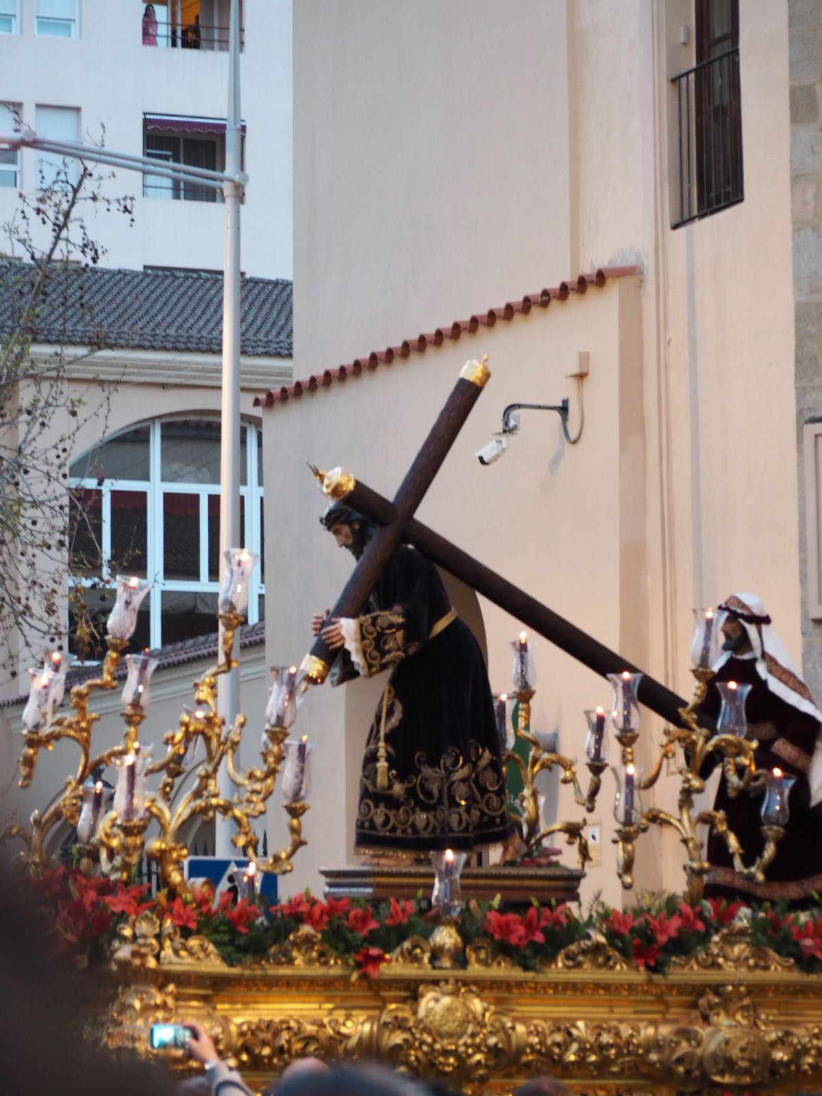 Nuestro Padre Jesús del Amparo Miércoles Santo 2018. Badajoz.